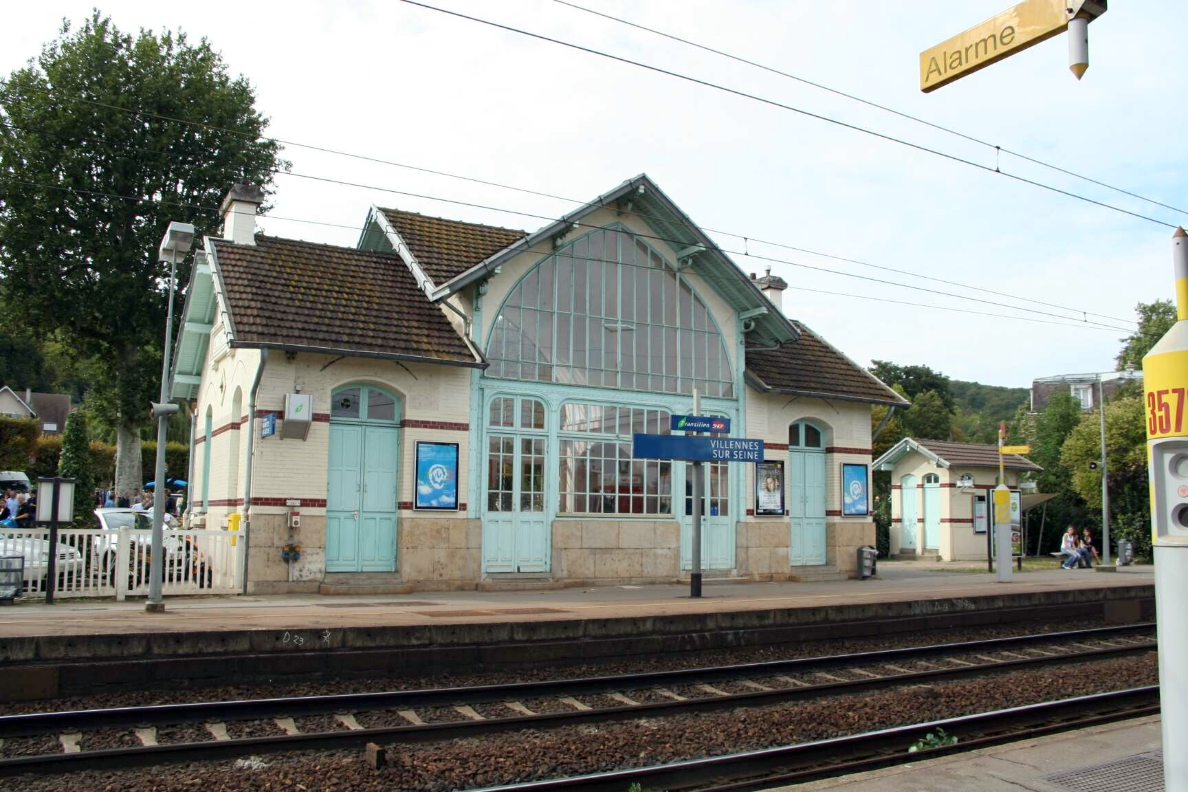 Gare de Villennes-sur-Seine - Yvelines (France)